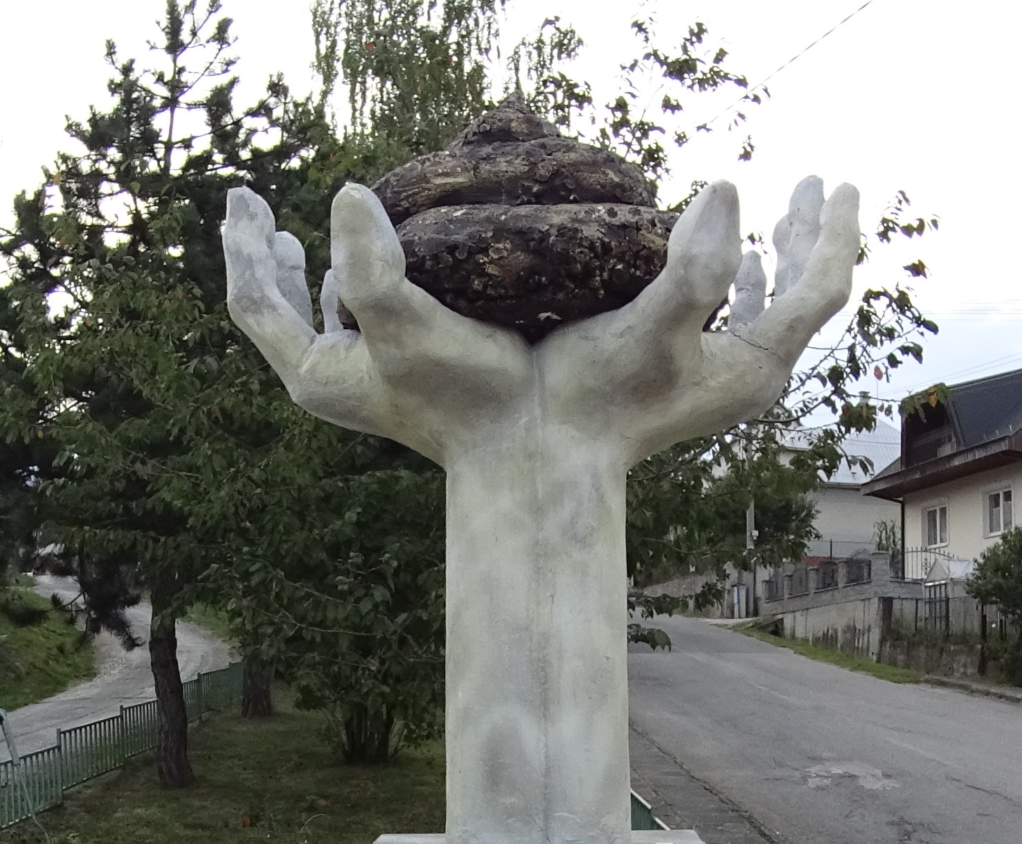 Horná Dolná, exteriéry Novej Lehoty